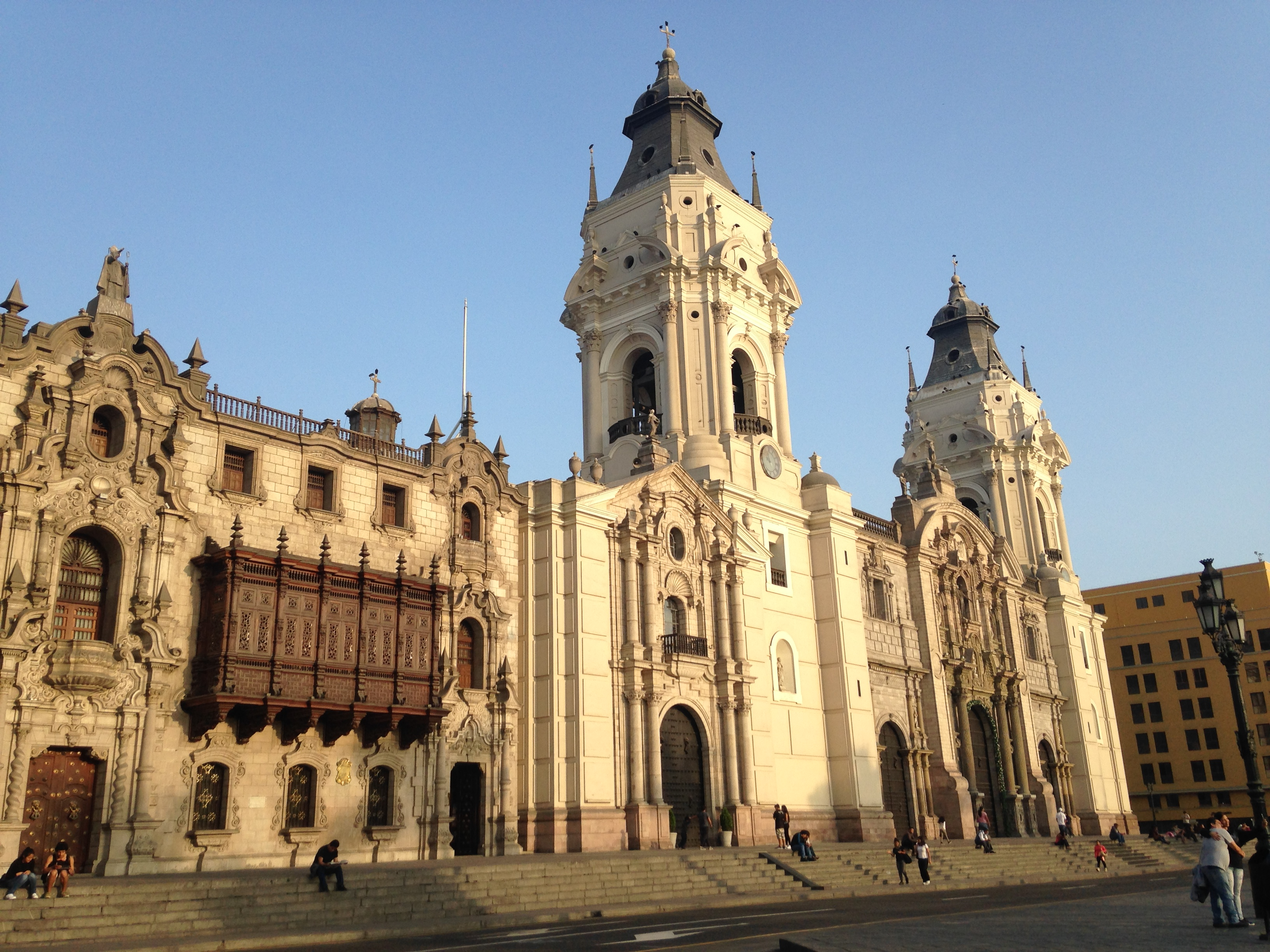 Vista del frontis de la Catedral de Lima